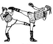 boxe_femme.jpg